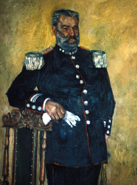 Oberstløytnant, sjef for Söndmöre Landstormsbataljon og arkeolog